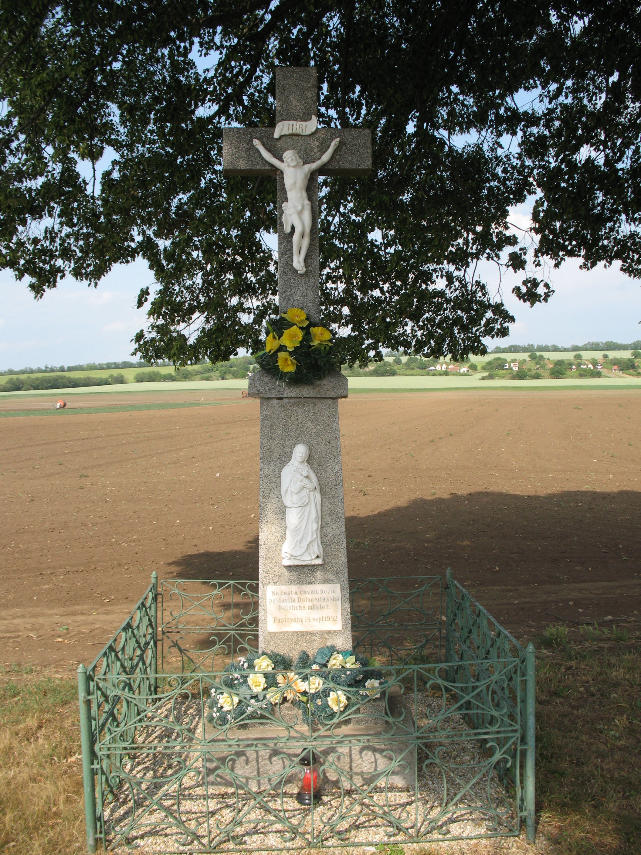 Alsószőlősi kereszt, amelyet 1942-ben emeltek